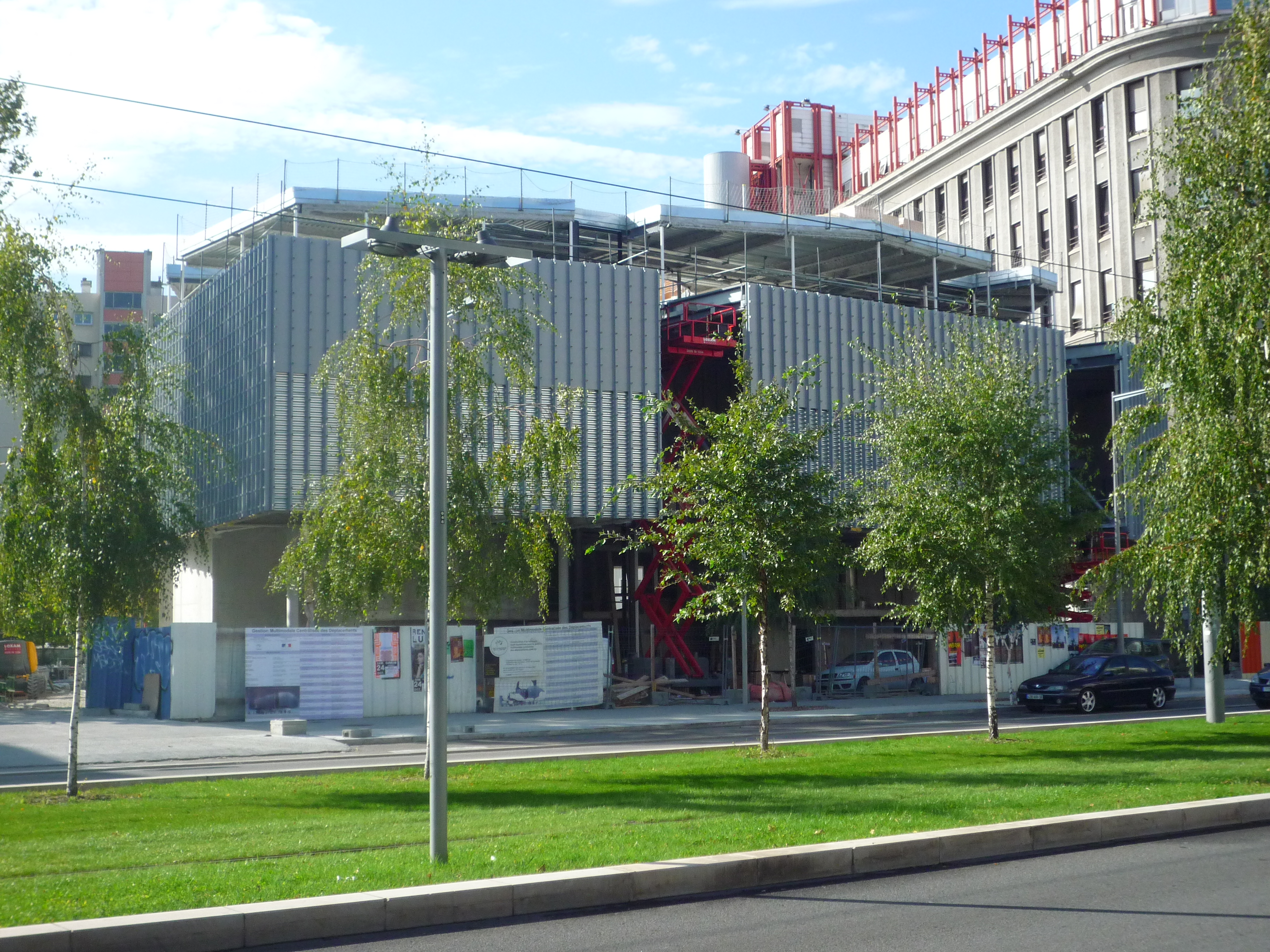 Bâtiment Gestion Multimodale Centralisée des Déplacements situé sur le boulevard Joseph vallier - Grenoble